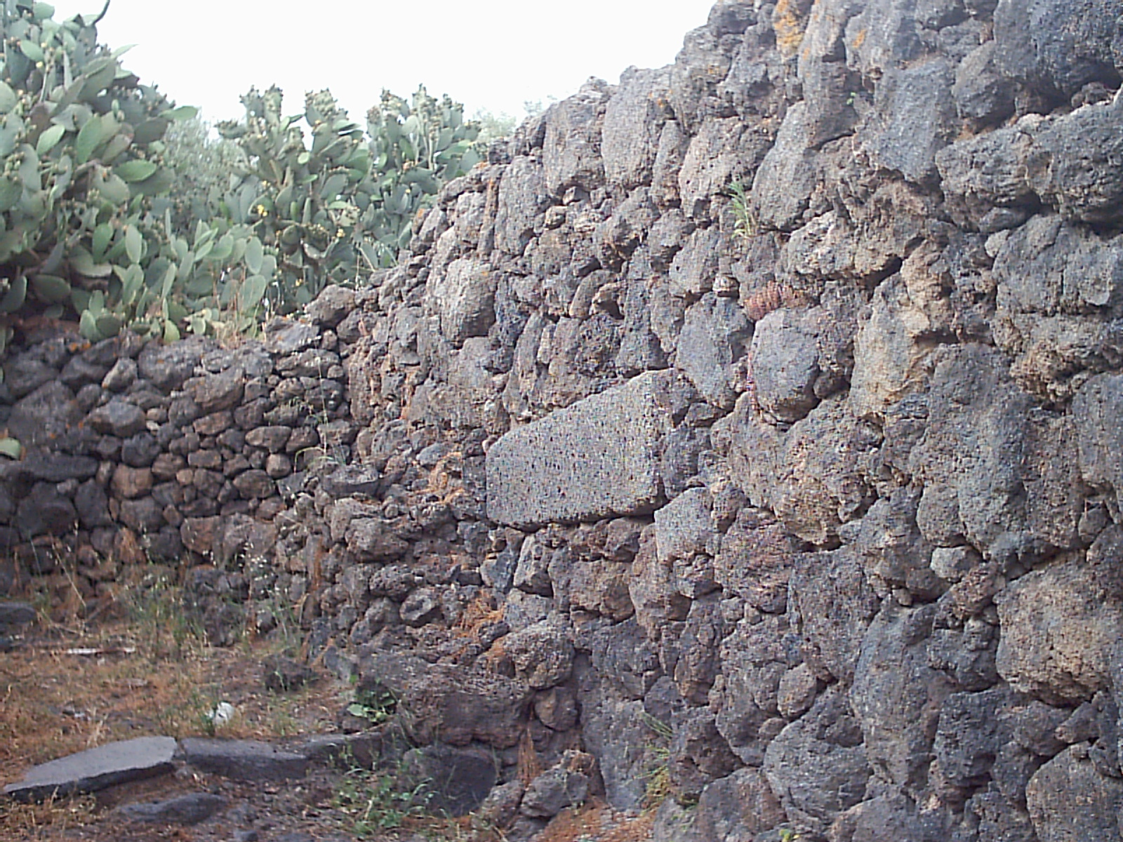 Zermo Giuseppe Marzio